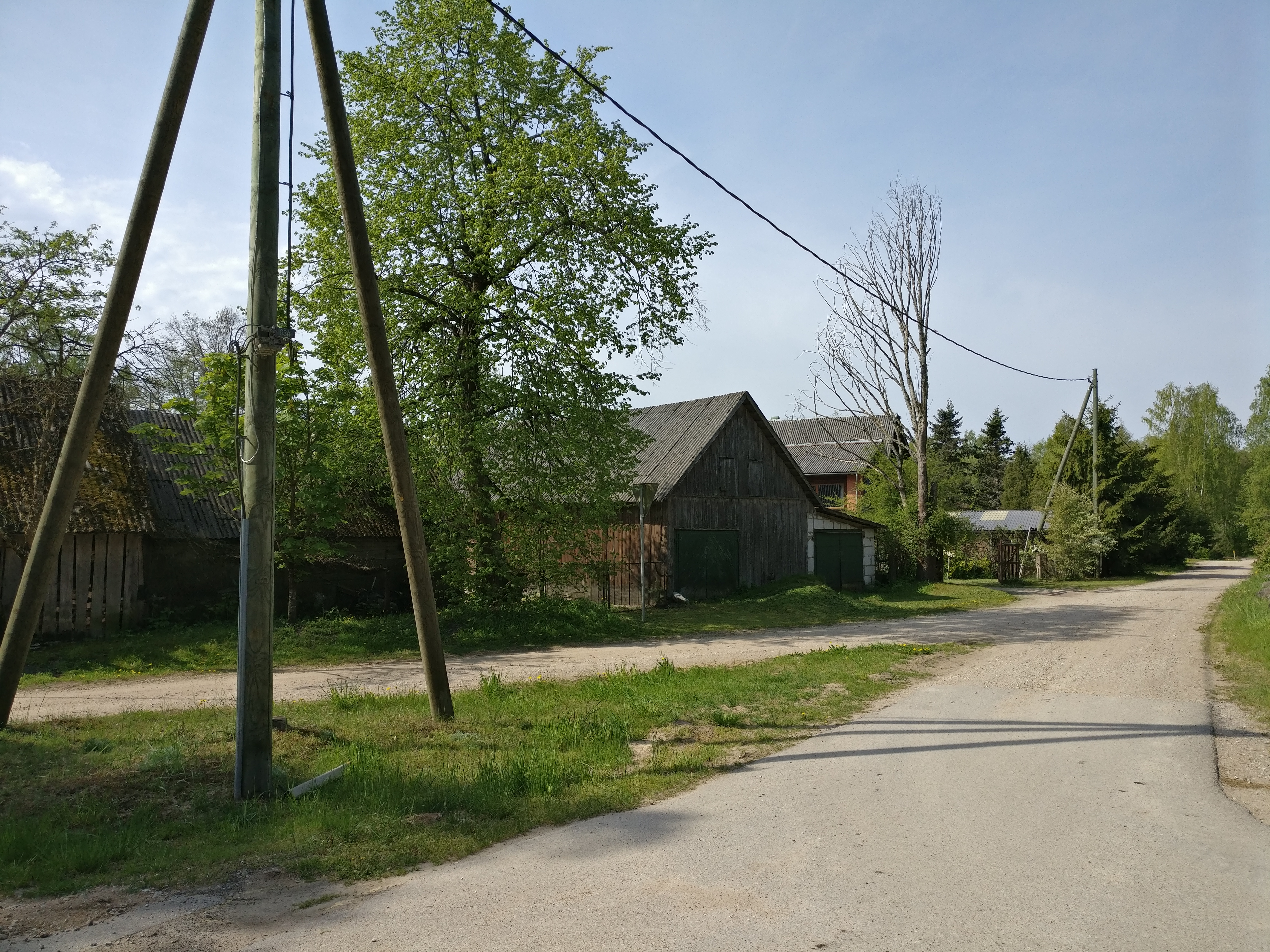 Plieņciems